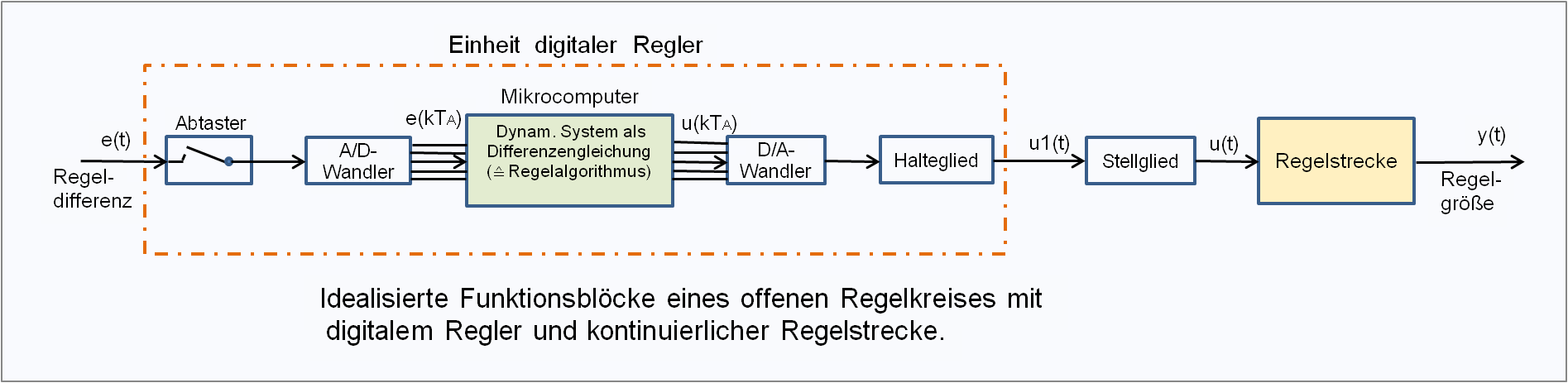 Funktionsblöcke eines digitalen Reglers im offenen Regelkreis.